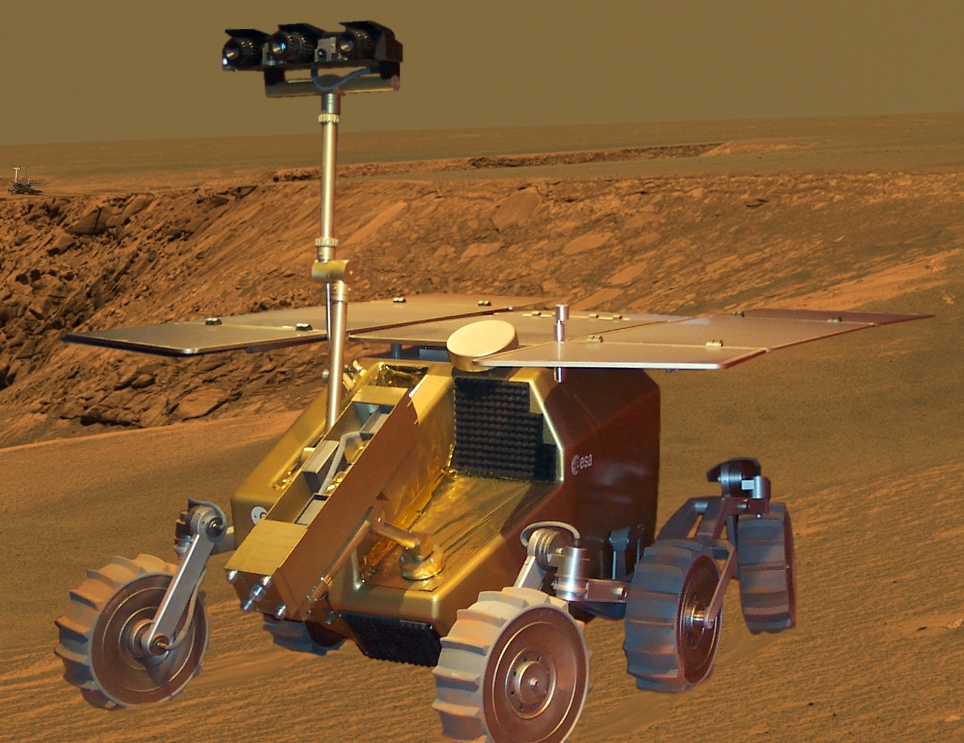 Exomarsmodell auf der ILA 2006 (Berlin)